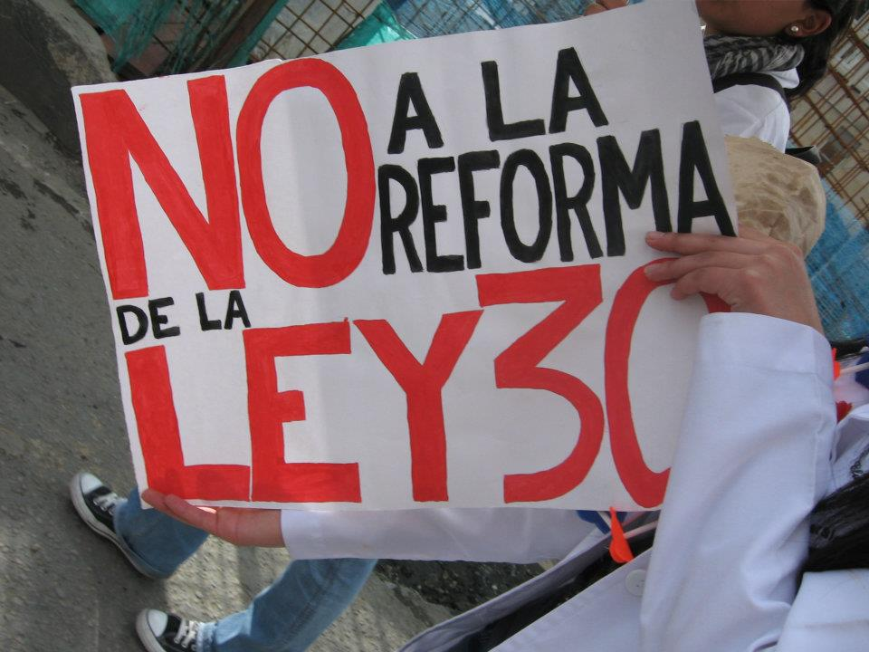 Cartel en protesta a la reforma a la educación superior en Colombia de 2011